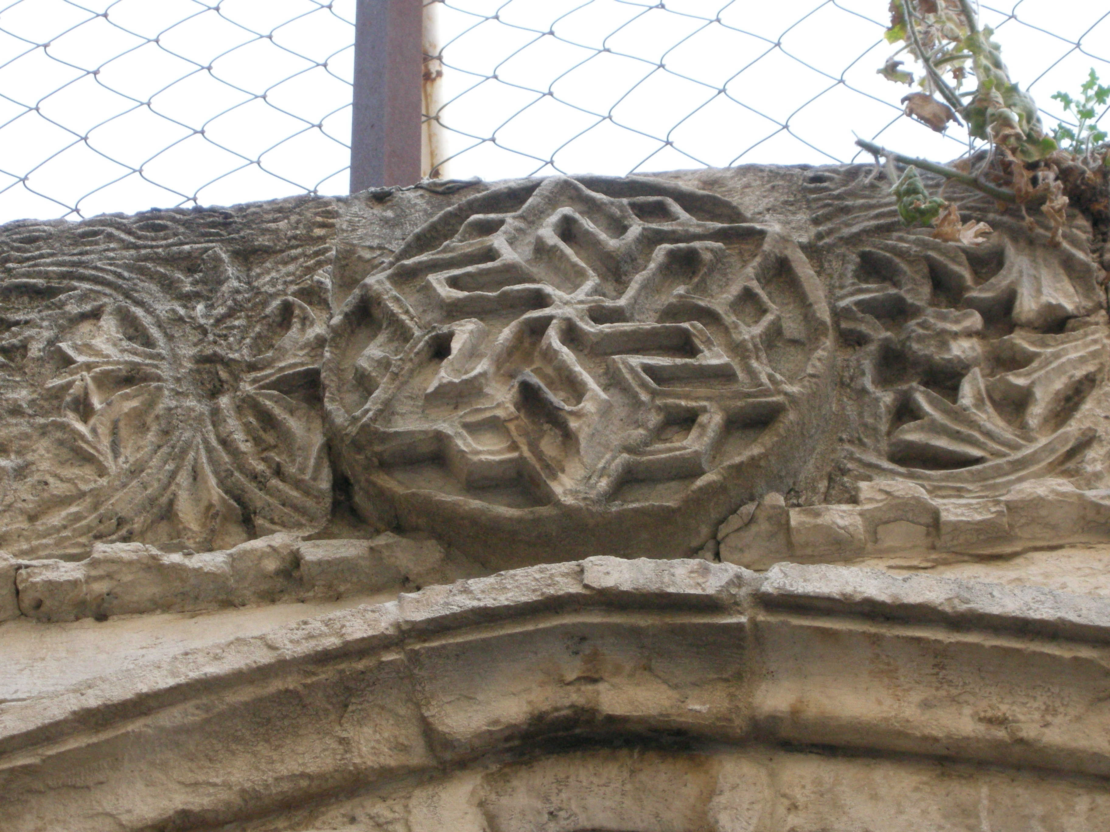 Mamluk impact on Jerusalem